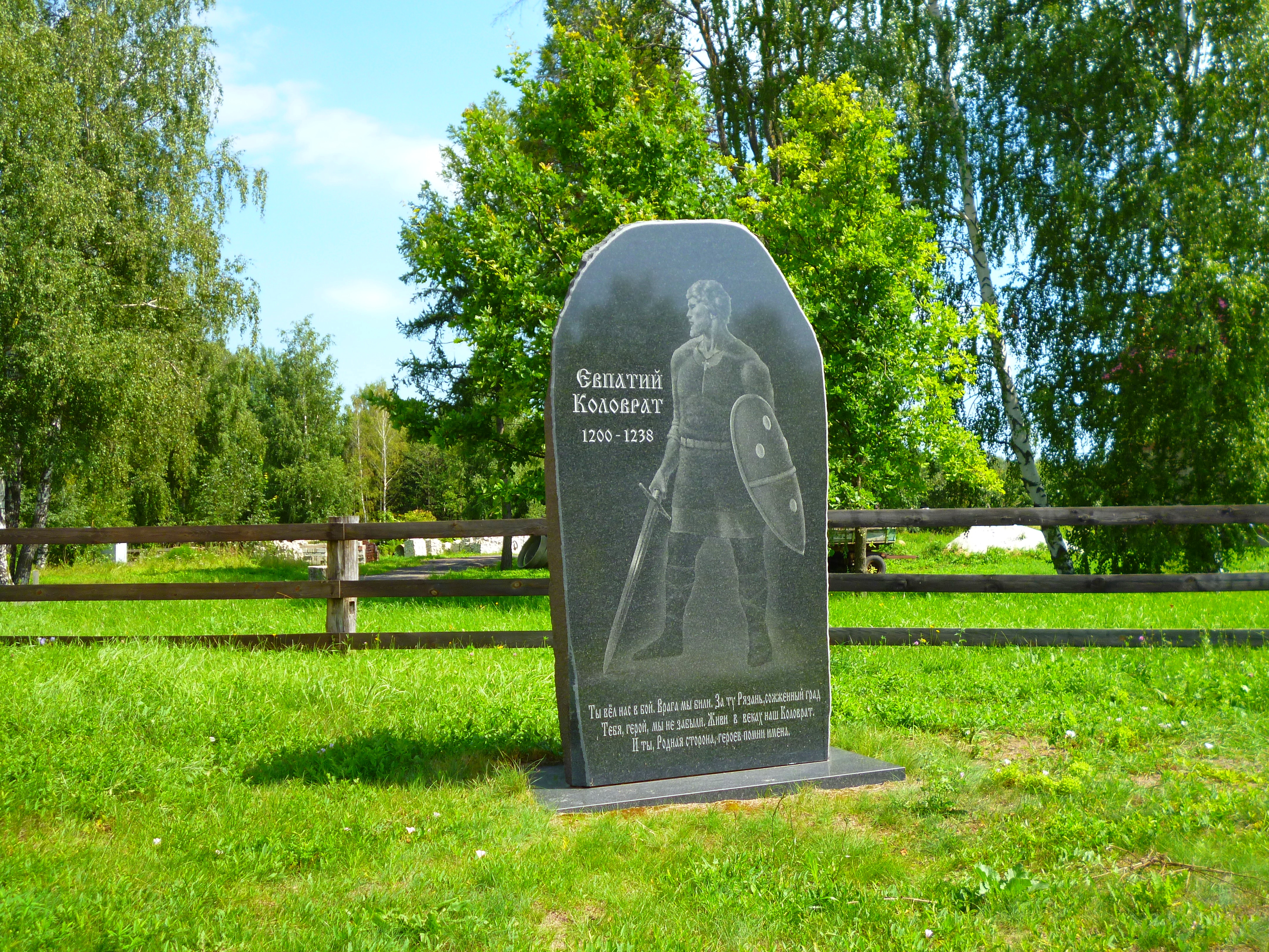 Шиловский район, дер. Фролово. Памятник легендарному рязанскому боярину и воеводе Евпатию Коловрату, 2006.